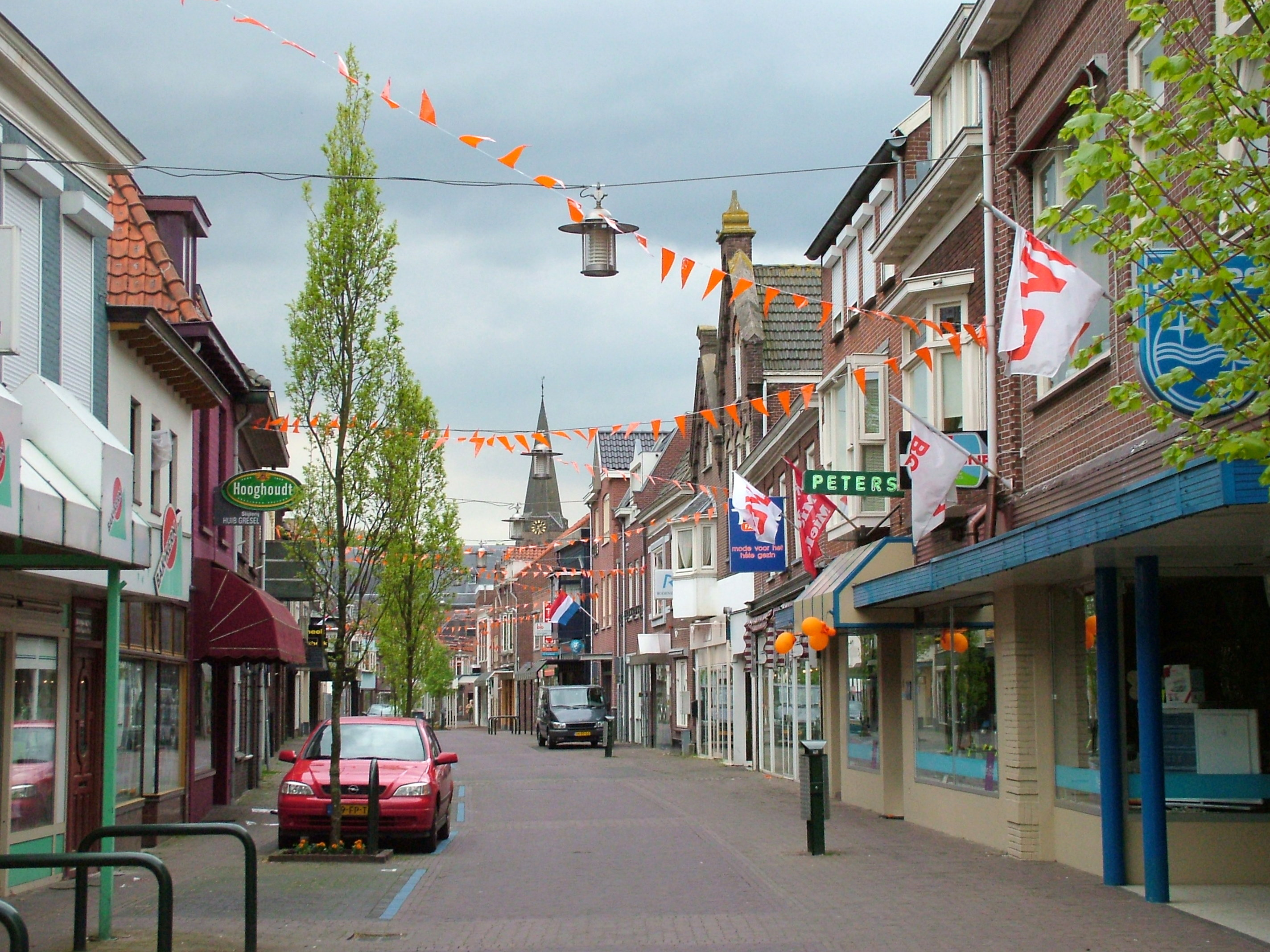 Hoofdstraat Terborg, Koninginnedag 2008